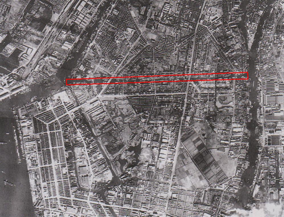 大阪市大正区にある大正運河の場所。航空写真。赤い枠内が大正運河。